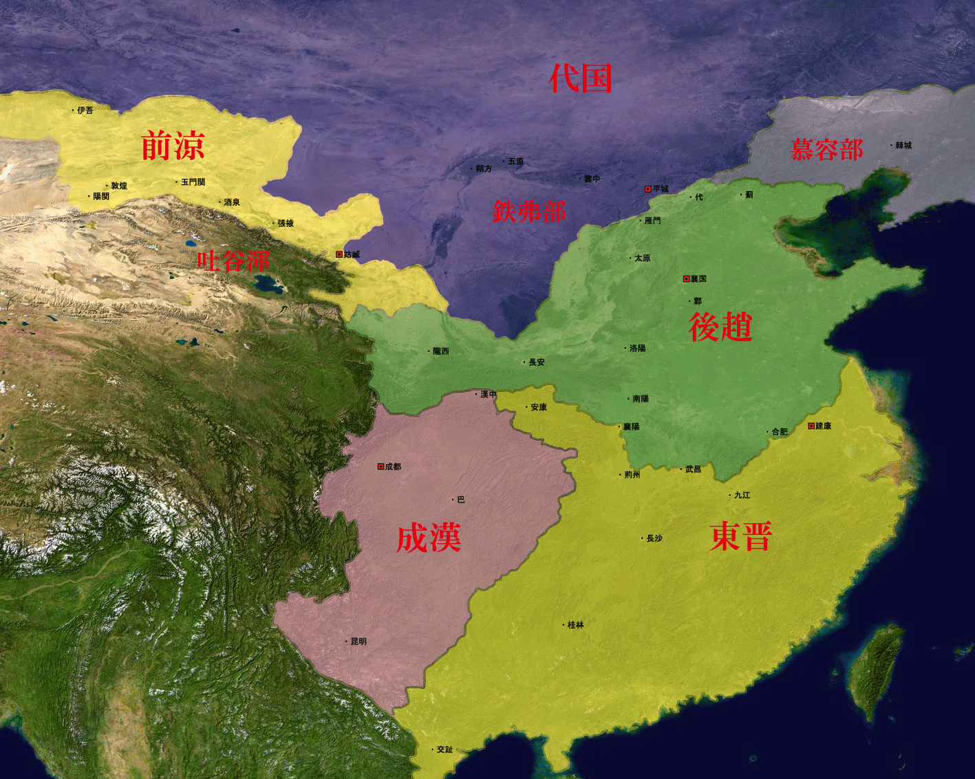 五胡十六国時代の後趙、東晋、成漢、前涼、代国の領域。